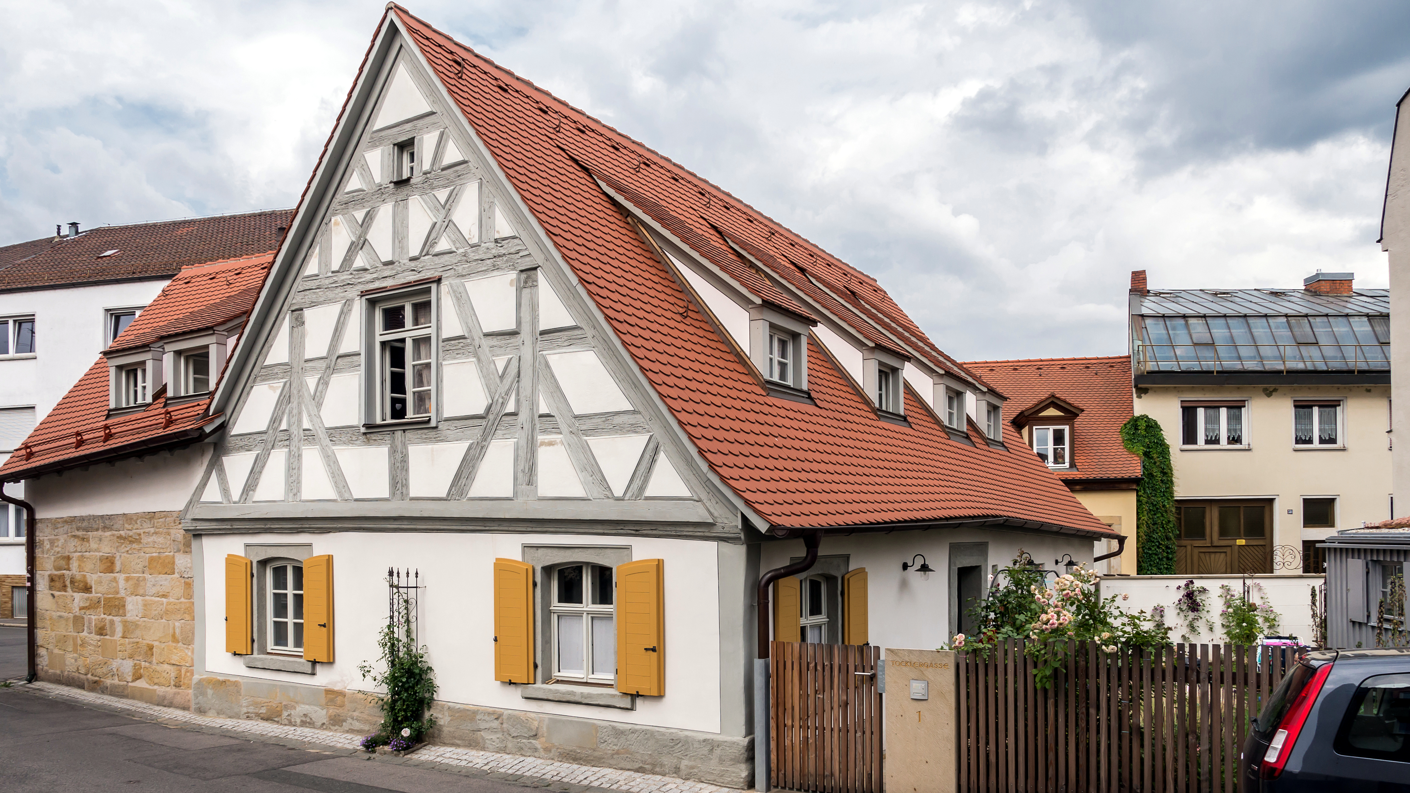 Bamberg Tocklergasse 1This is a photograph of an architectural monument.